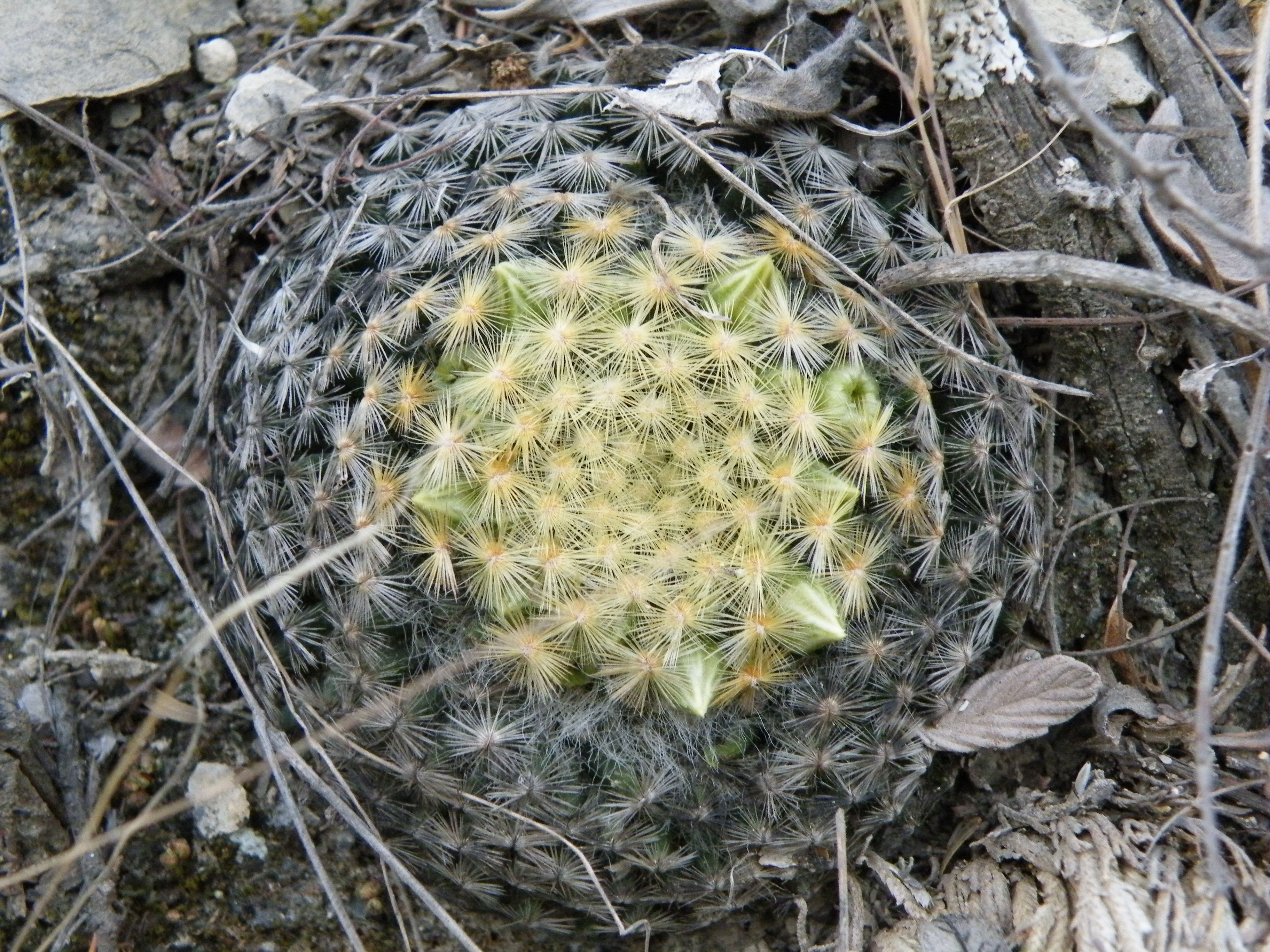 Xichu, Guanajuato